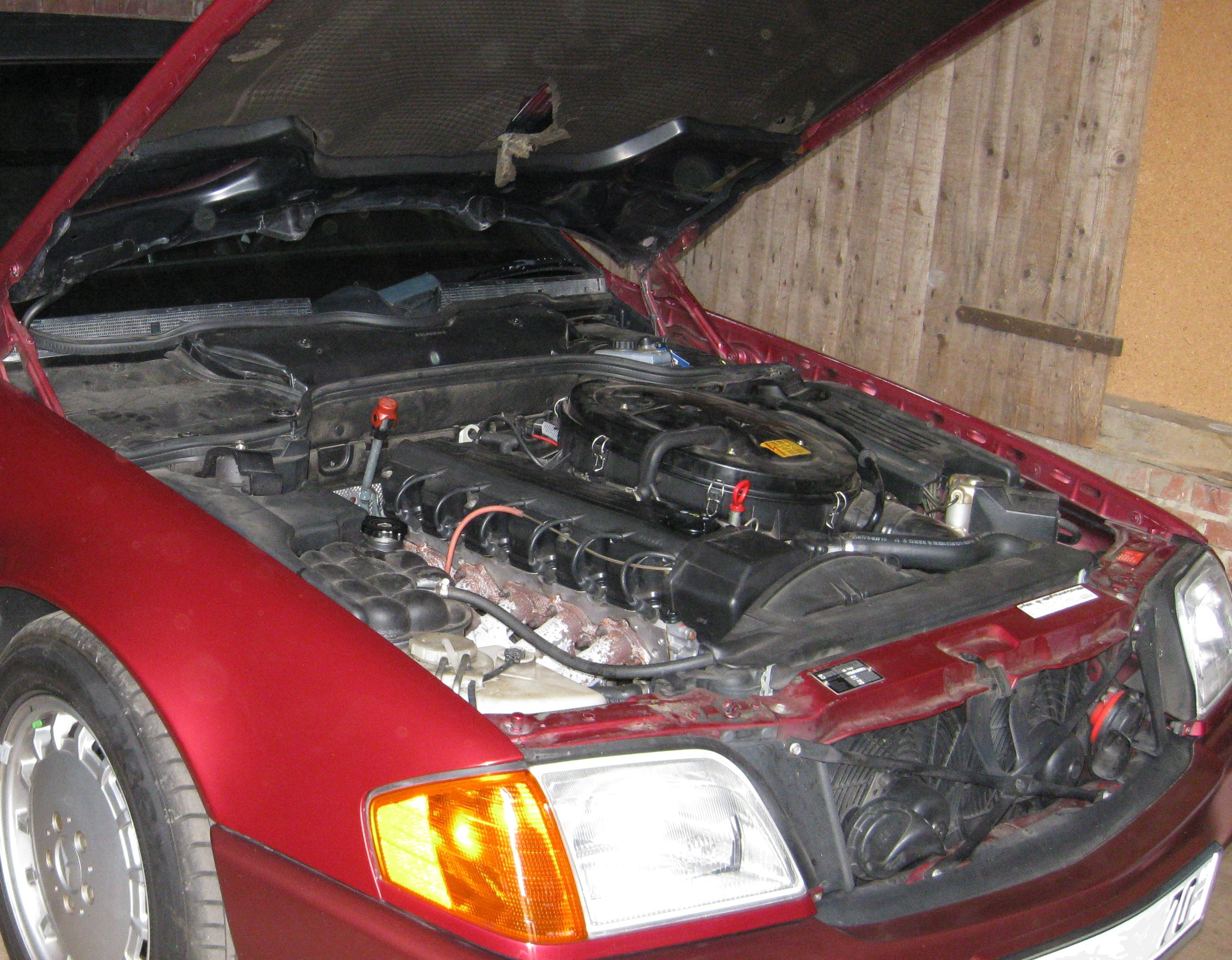 Motorraum eines 300SL